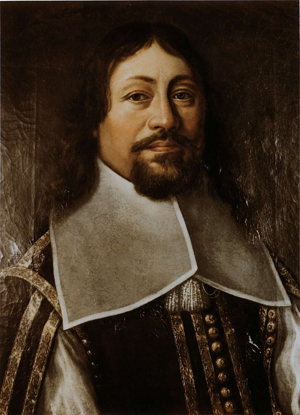 Samuel Tribolet (1616–1673), Mitglied des Grossen Rats 1645, Landvogt zu Trachselwald 1649.